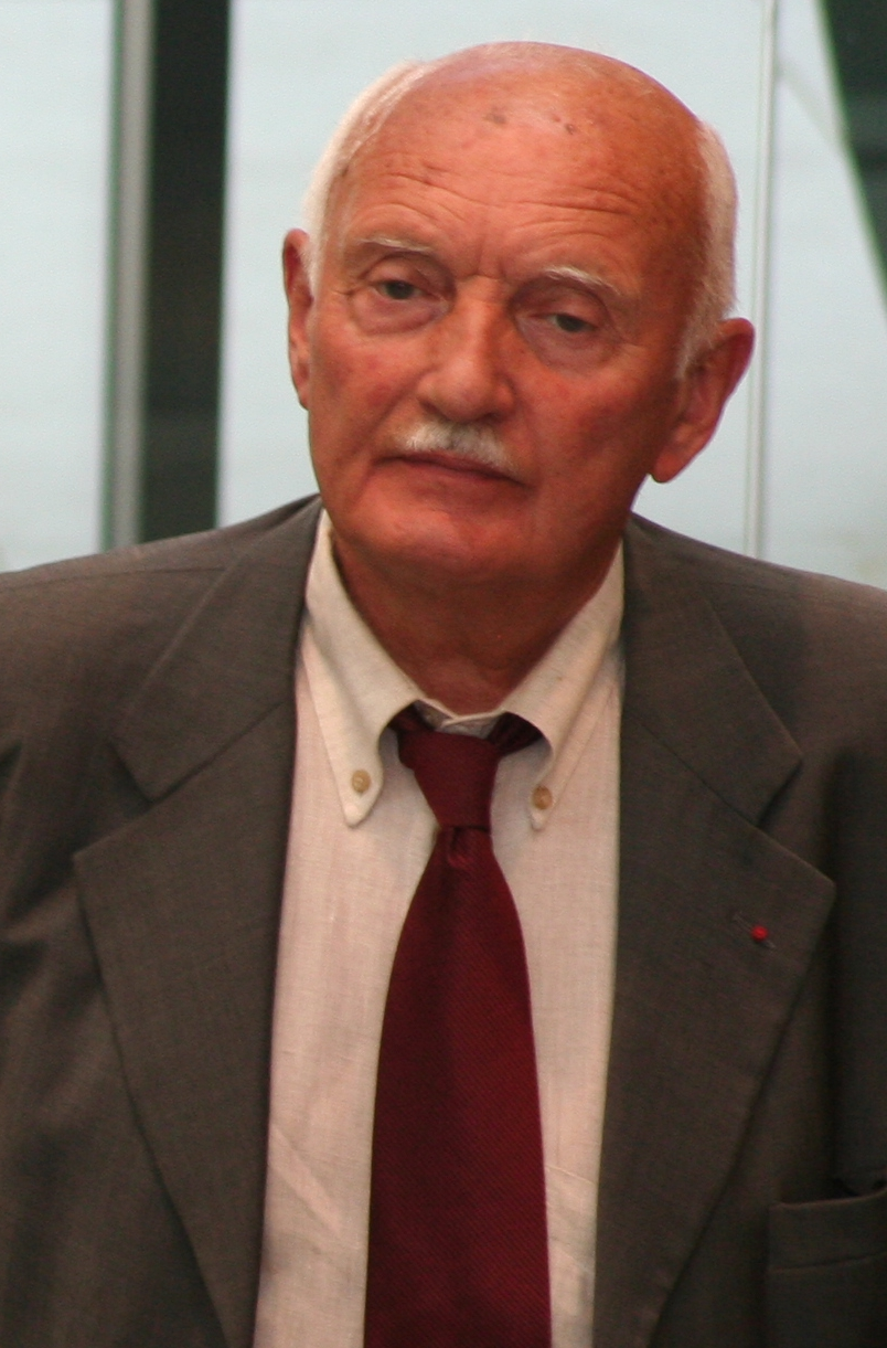 Jean Milhau le 10 juillet 2008.